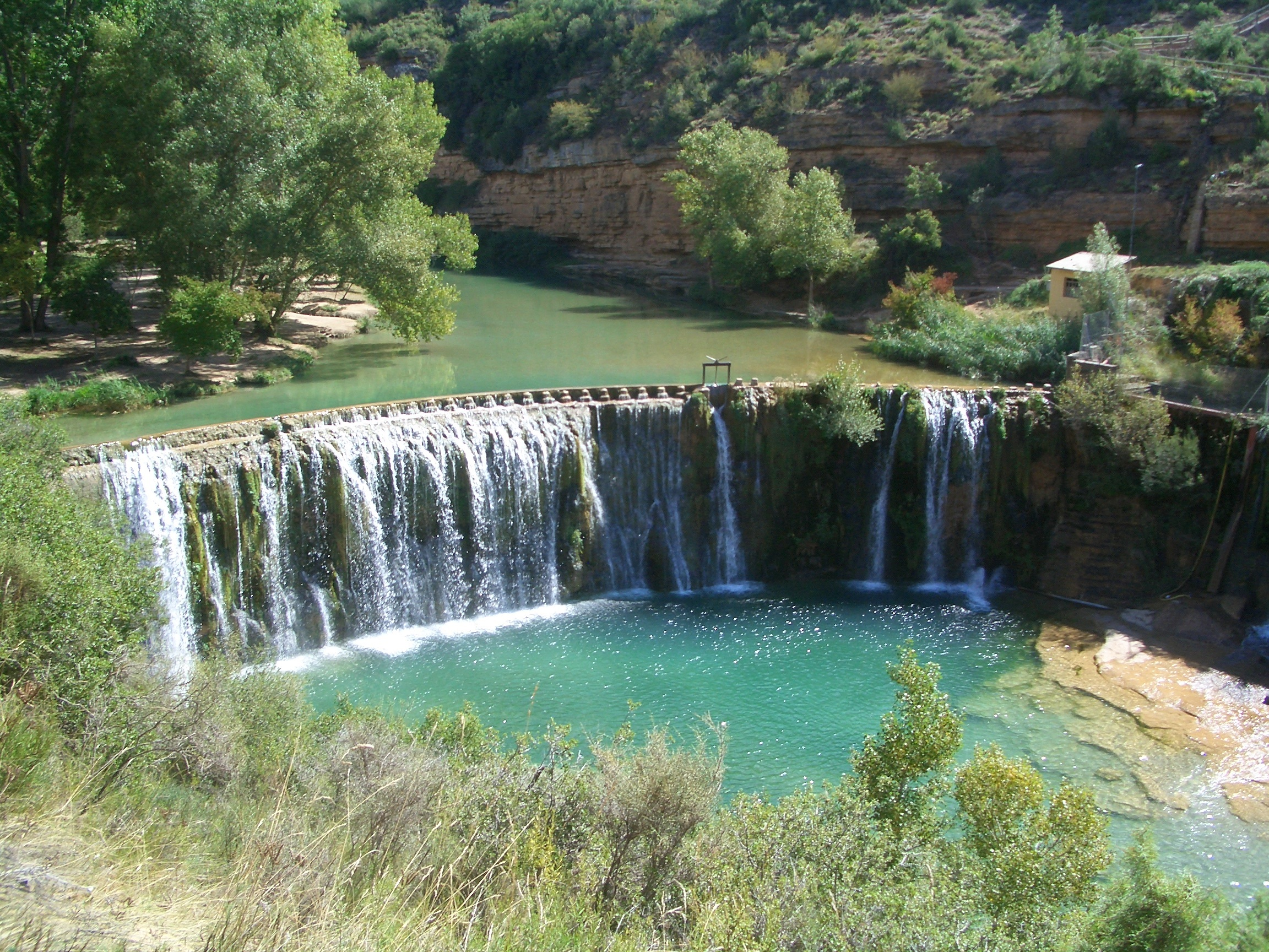 El Salto de Bierge al riu Alcanadre